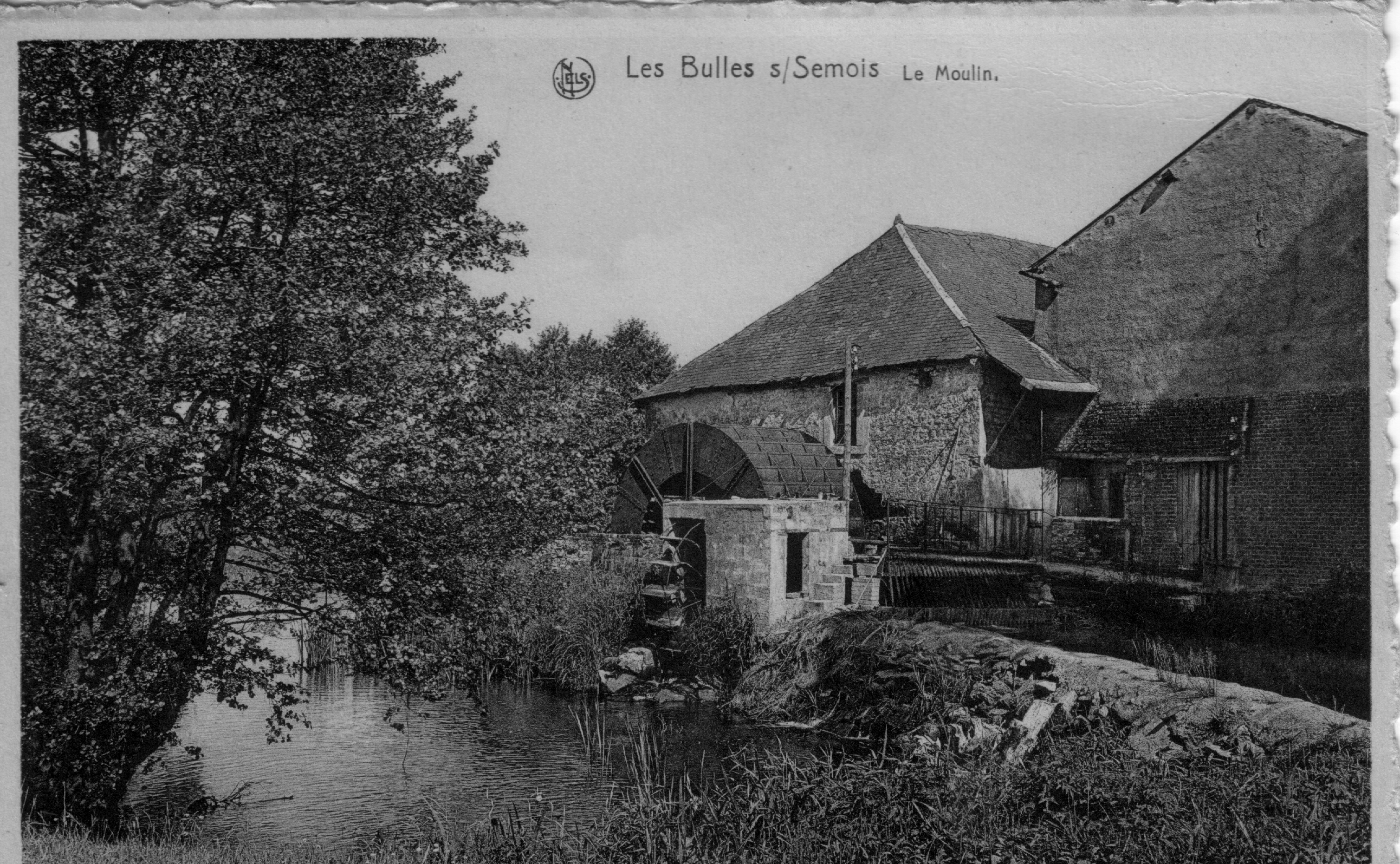 Moulin sur la Vierre à l'entrée du village de Les Bulles, Belgique en 1909.